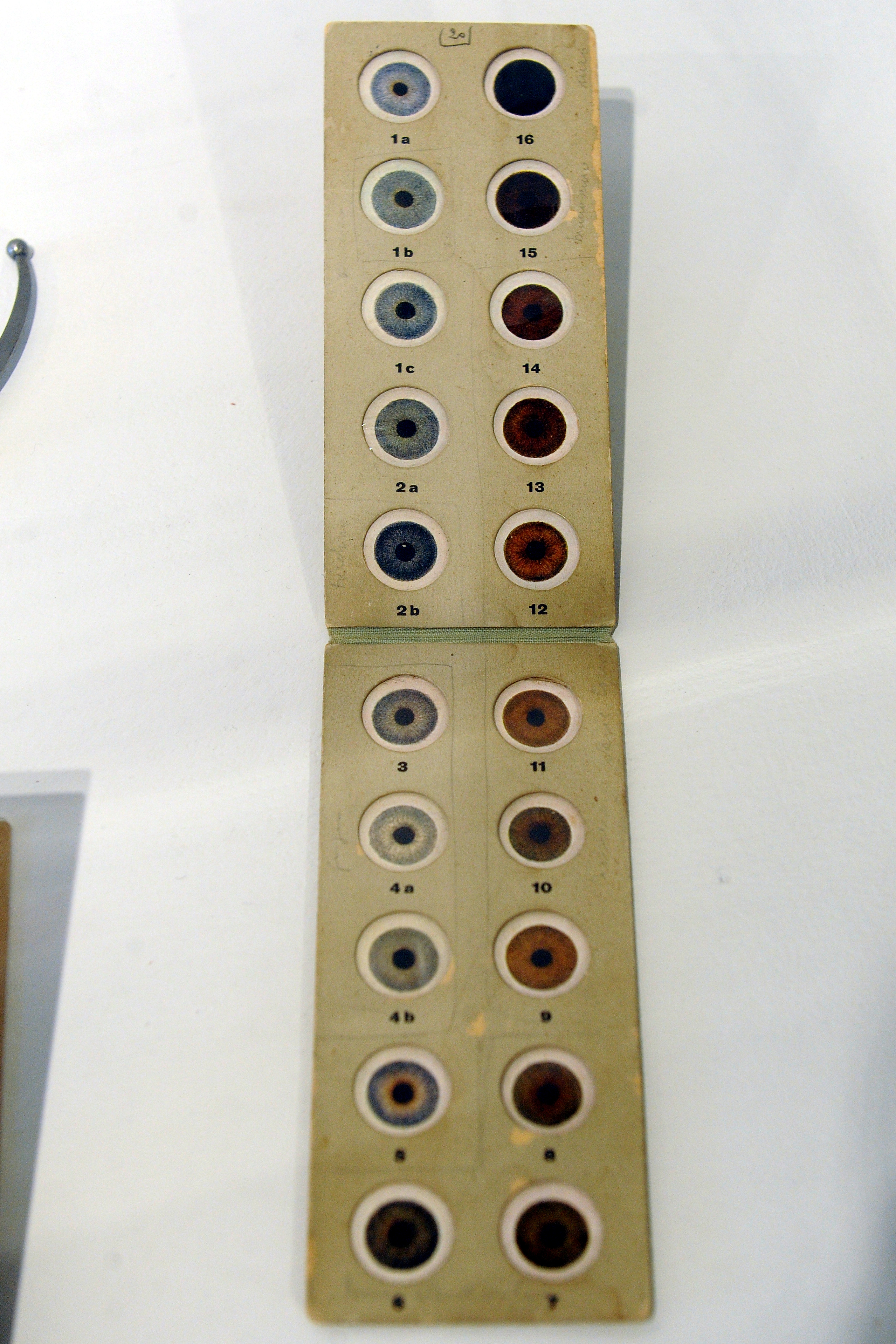 Tavola dei colori degli occhi di Rudolf Martin. Mostra "Imago Animi. Volti dal passato". Palazzo Assessorile di Cles.